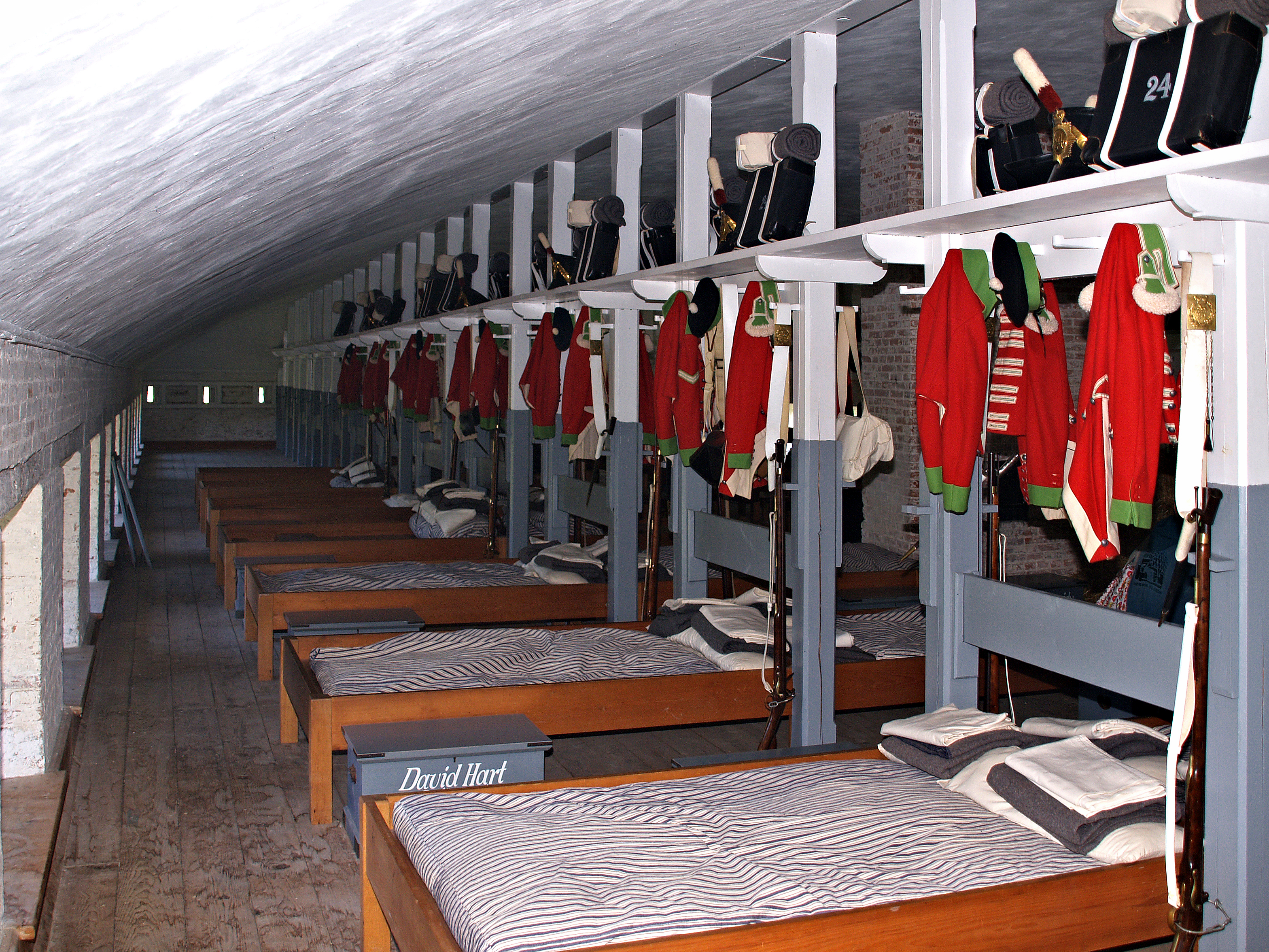 Saint-Paul-de-l'Île-aux-Noix (Québec) - Un des dortoirs du 24e régiment d’infanterie au Fort Lennox